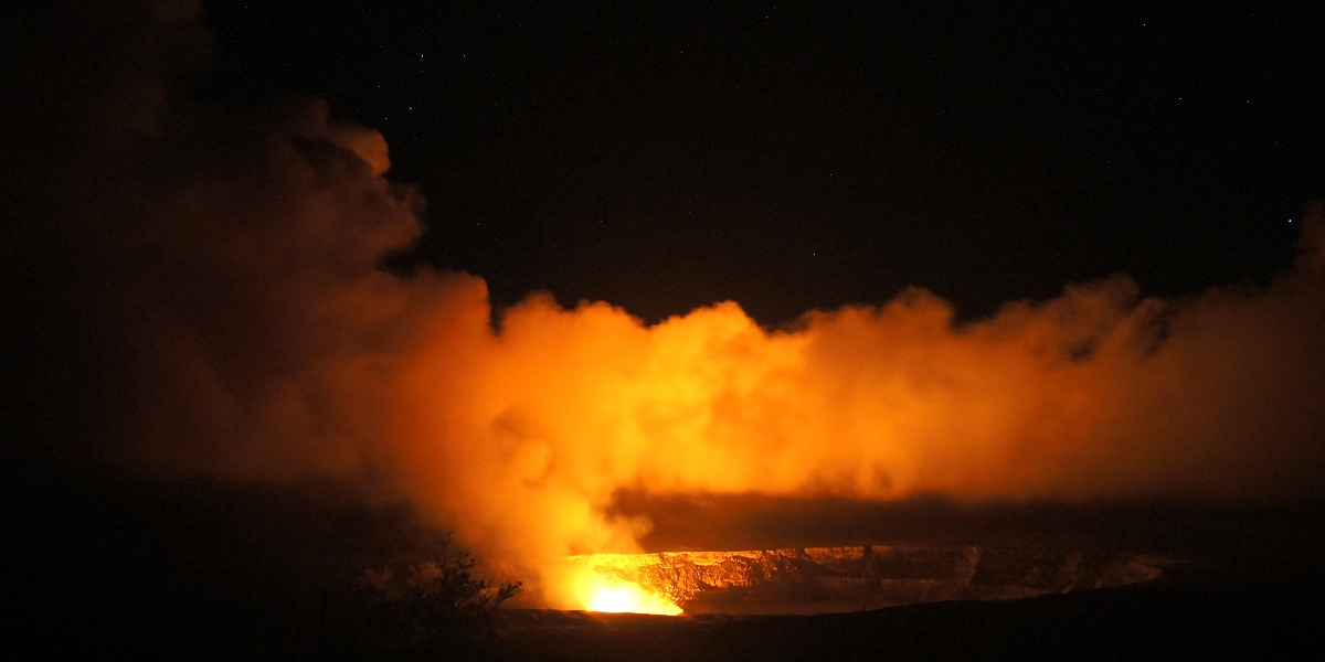 Иллюстрация для викиучебника Гавайеведение